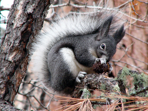 Abert’s Squirrel (Sciurus aberti)